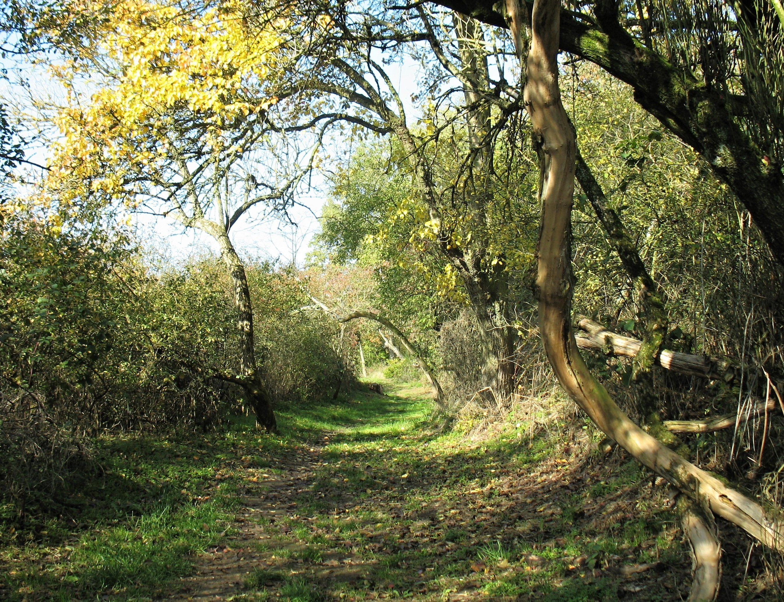 Historická Husí cesta na pomezí okresů Česká Lípa a Litoměřice. V úseku mezi Dřevčicemi a Martinskou stěnou, označovaném jako Stará Husí cesta, byla v roce 2015 vysázena alej ovocných stromů, později oceněná jako Alej roku 2017